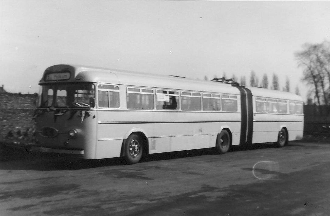 Der 1. Gliederbus der Stadtwerke Hamm nach Stilllegung der Straßenbahn 1961. Hier am Busdepot Wiesenstr./Wilhelmstr.